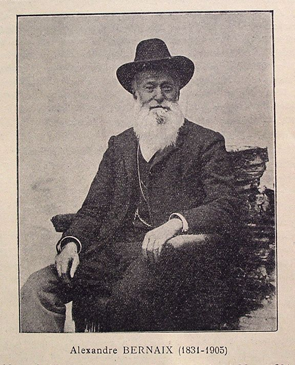 Alexandre Bernaix 1831-1905, rosiériste de Villeurbanne.